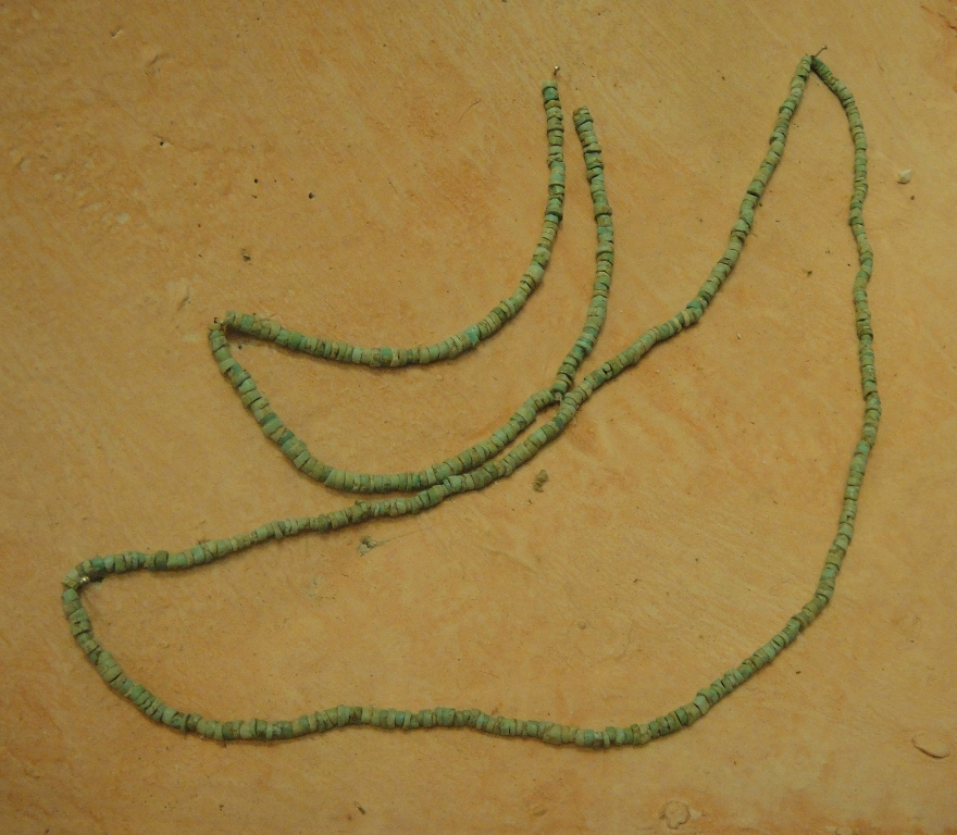 Template:Plazuelas turquoise collars